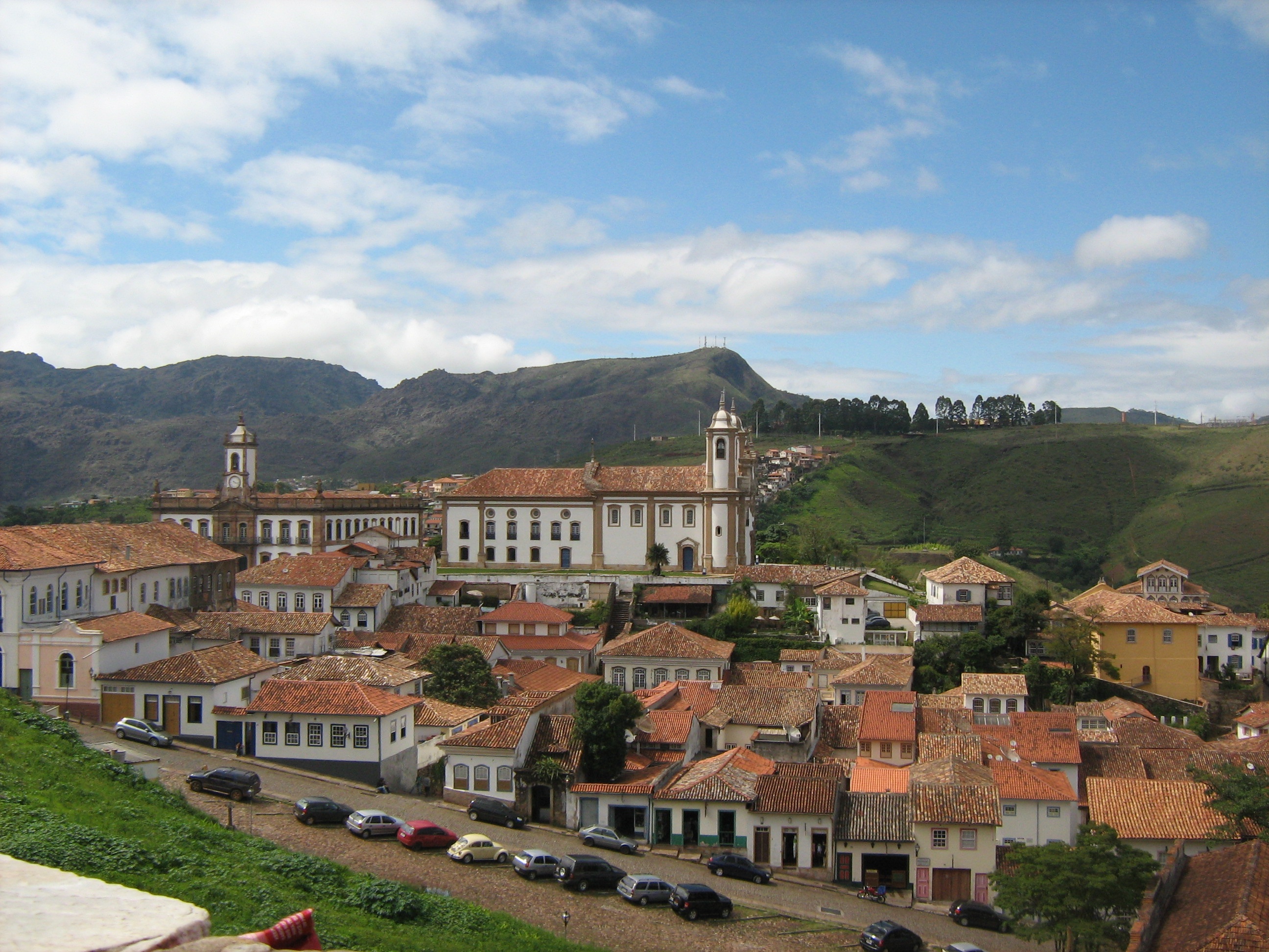 Vista parcial de Ouro Preto-MG